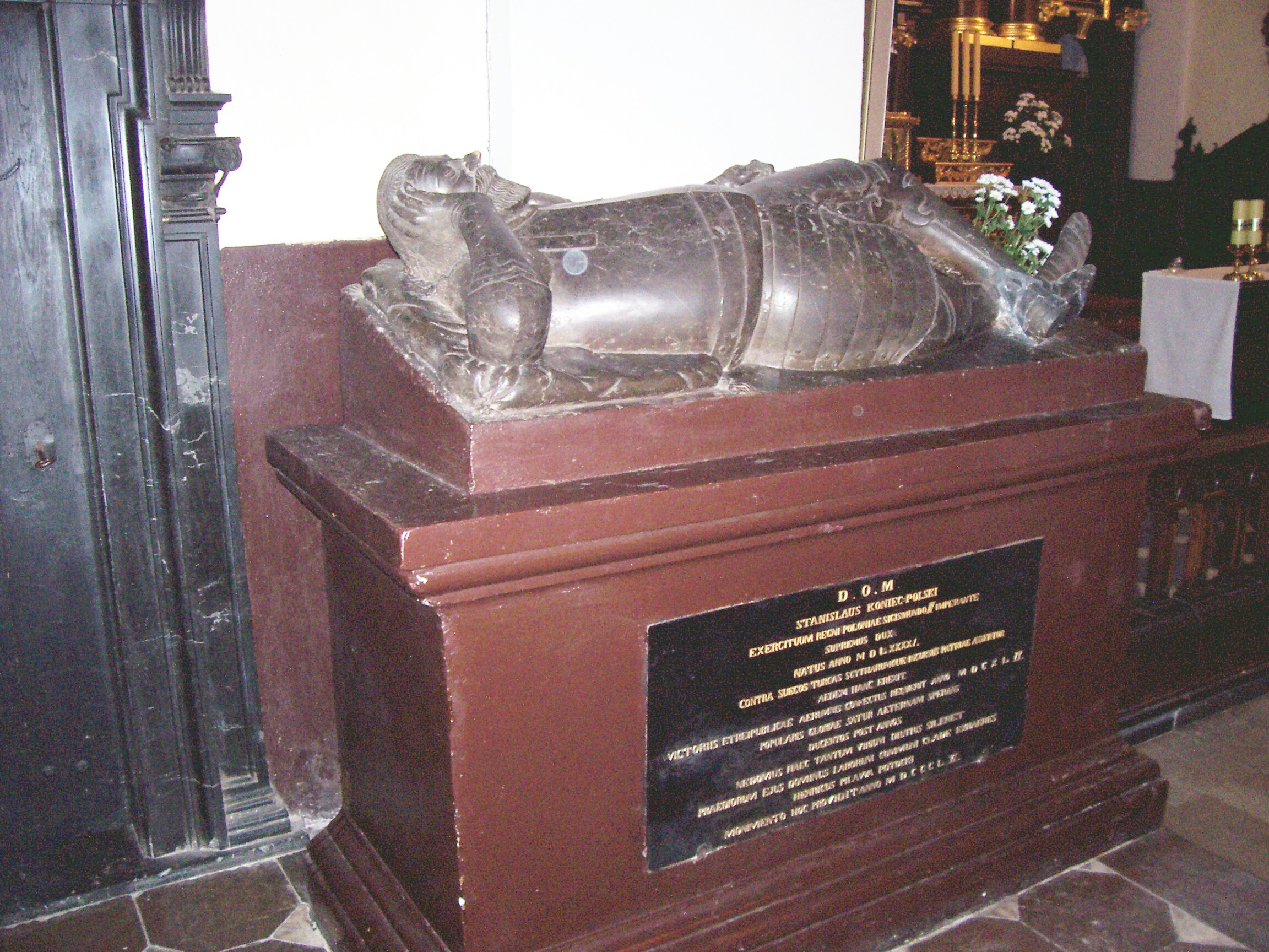 Nagrobek hetmana Koniecpolskiego